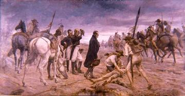 Paso del ejército del Libertador por el Páramo de Pisba